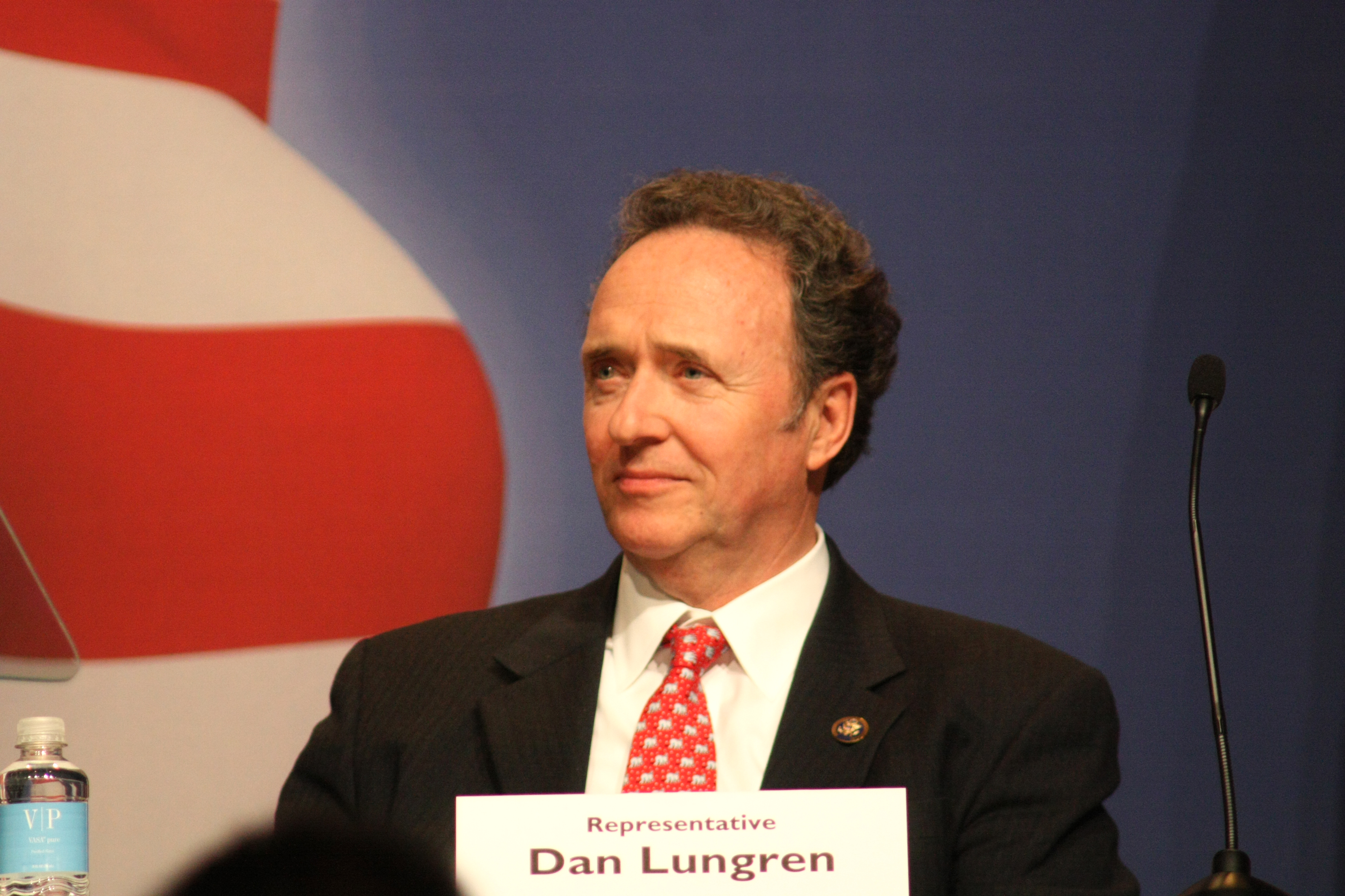 Congressman Dan Lungren speaking at CPAC.